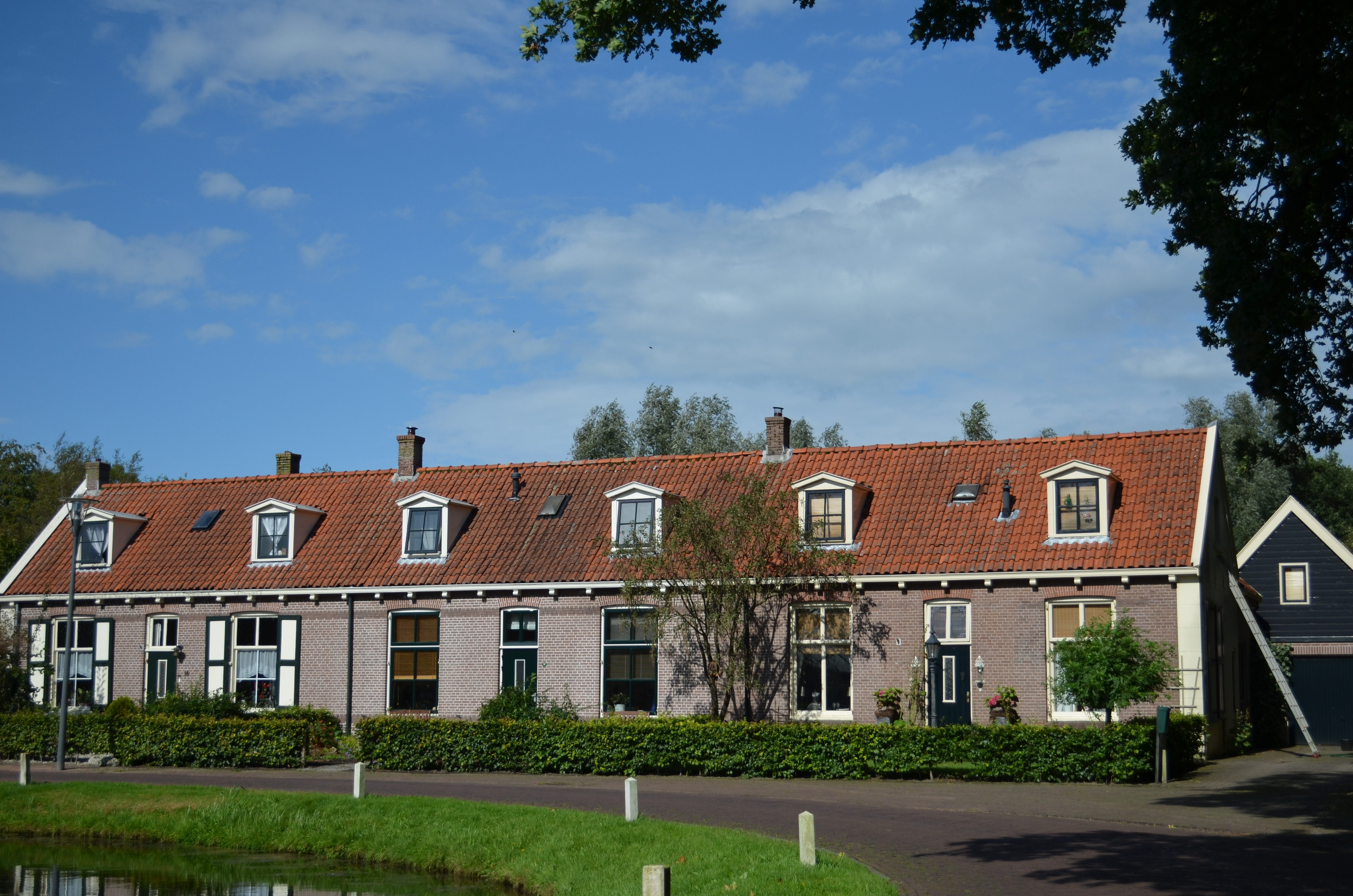 Rijksmonument Werkzaamheid drie huizen rechterpand, Oude Gracht 12-16